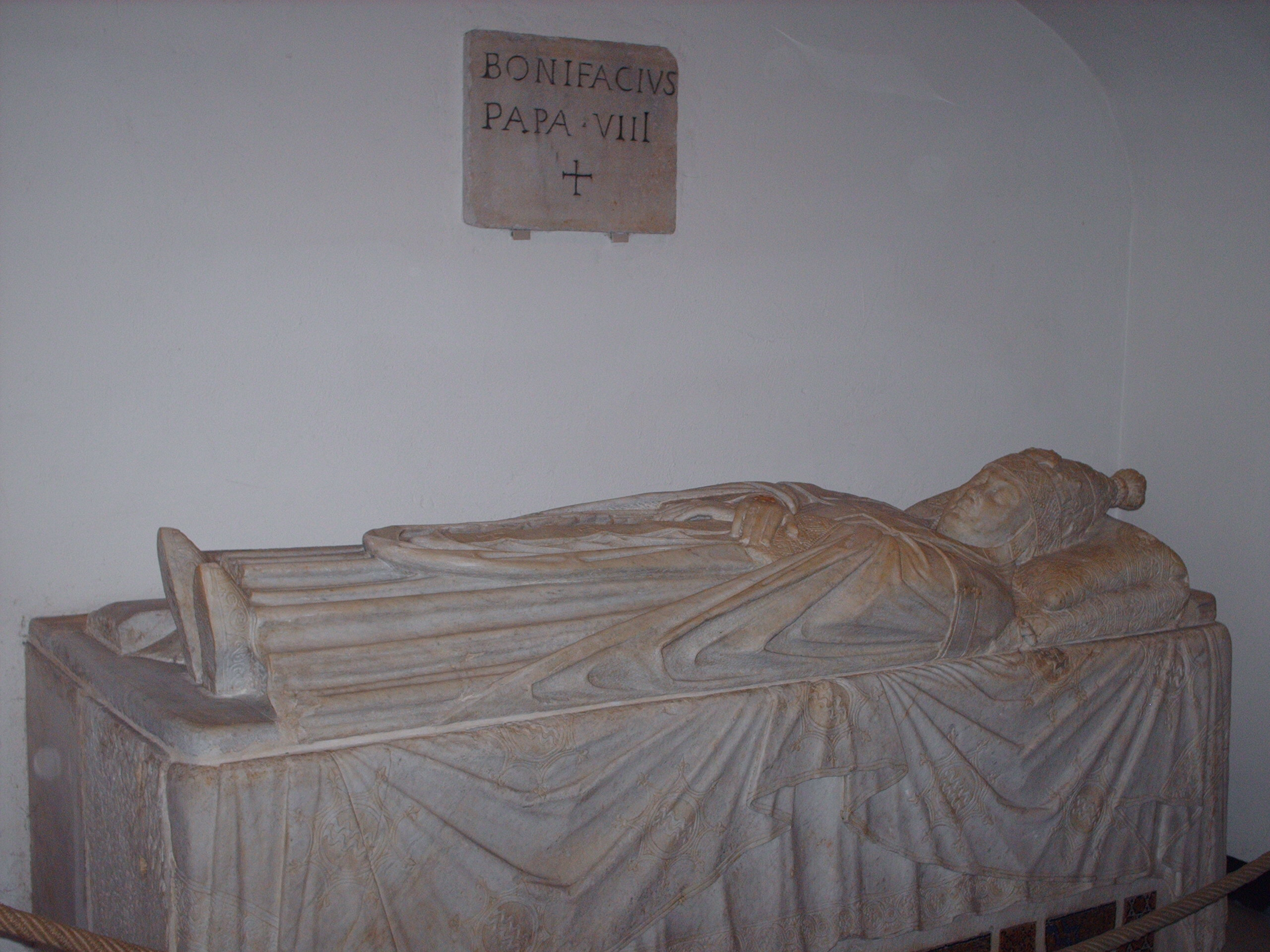 Tomb of Boniface VIII, under Basilica di San Pietro